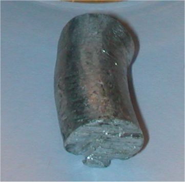 Bildbeschreibung: Aluminium Quelle: selbst fotografiert Fotograf/Zeichner: Tomihahndorf Datum: März 2006